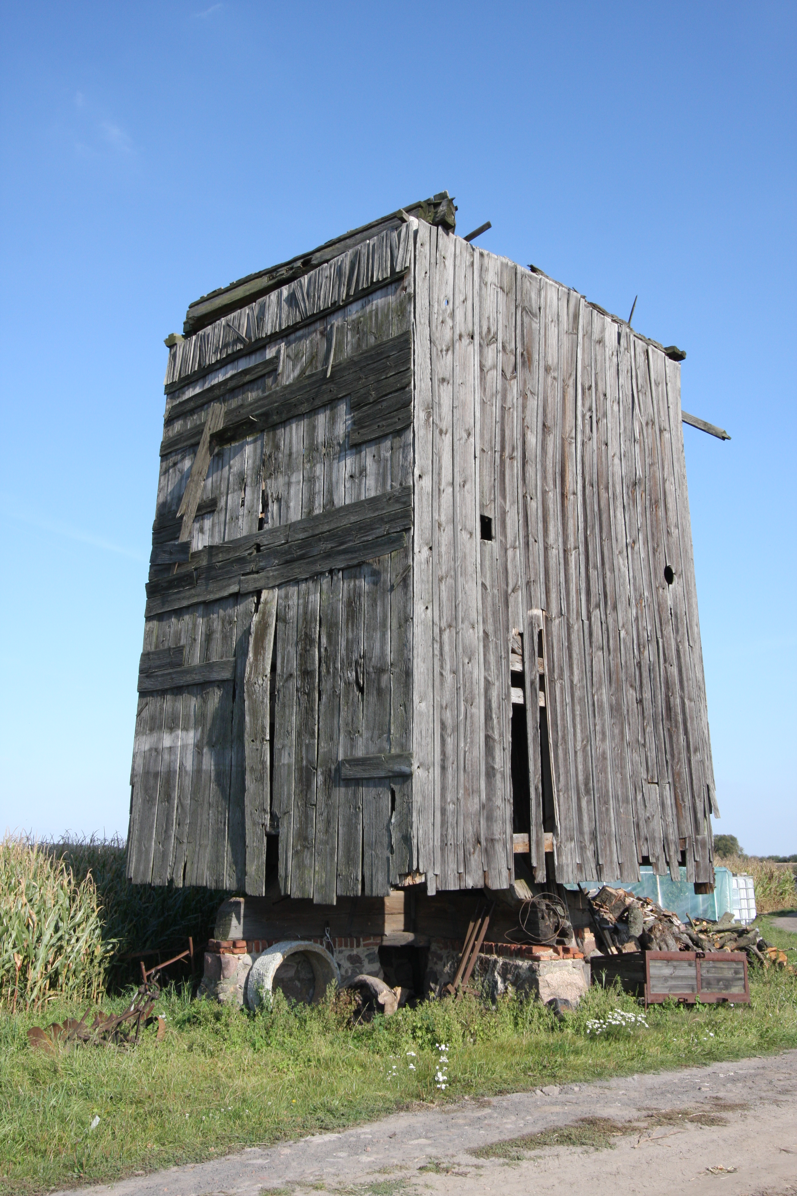 Rudniki, wiatrak koźlak, drewn., 1815